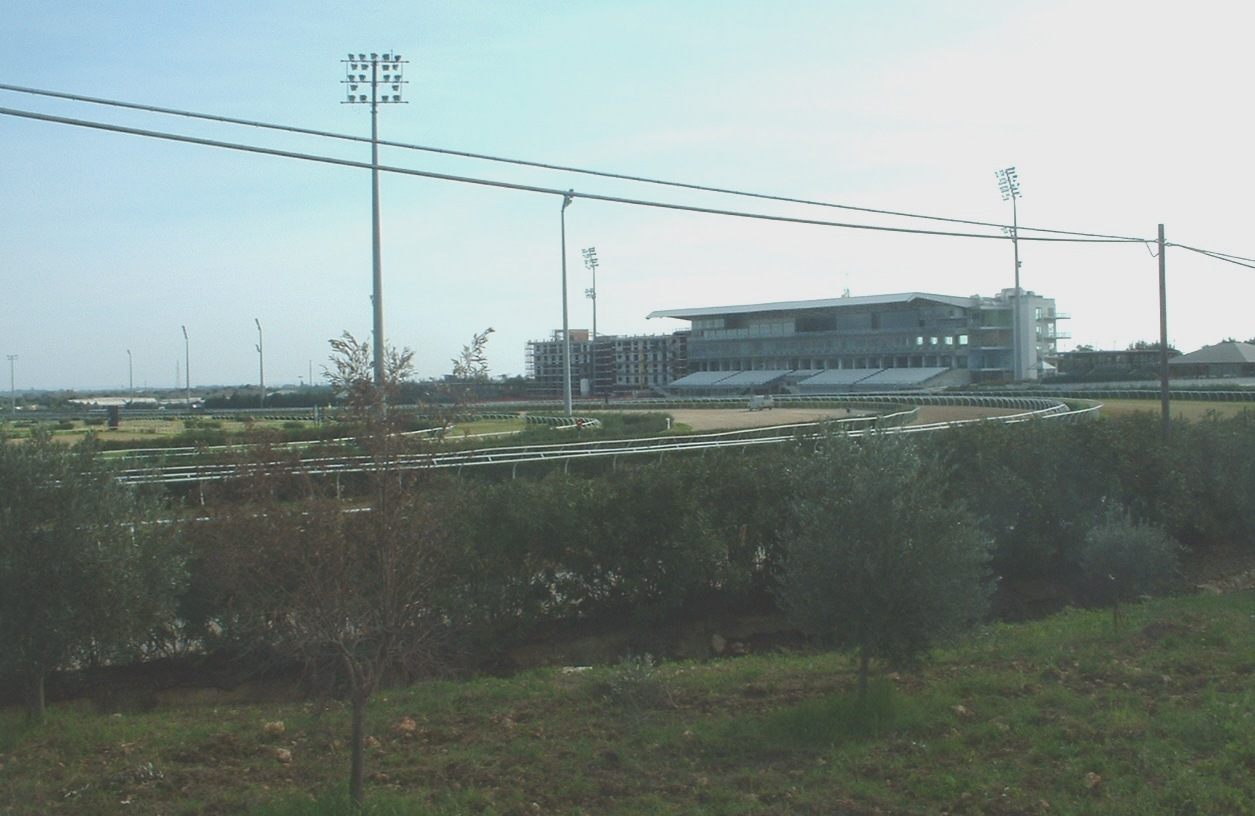 Cassibile (fraz. SR), Ippodromo del Mediterraneo